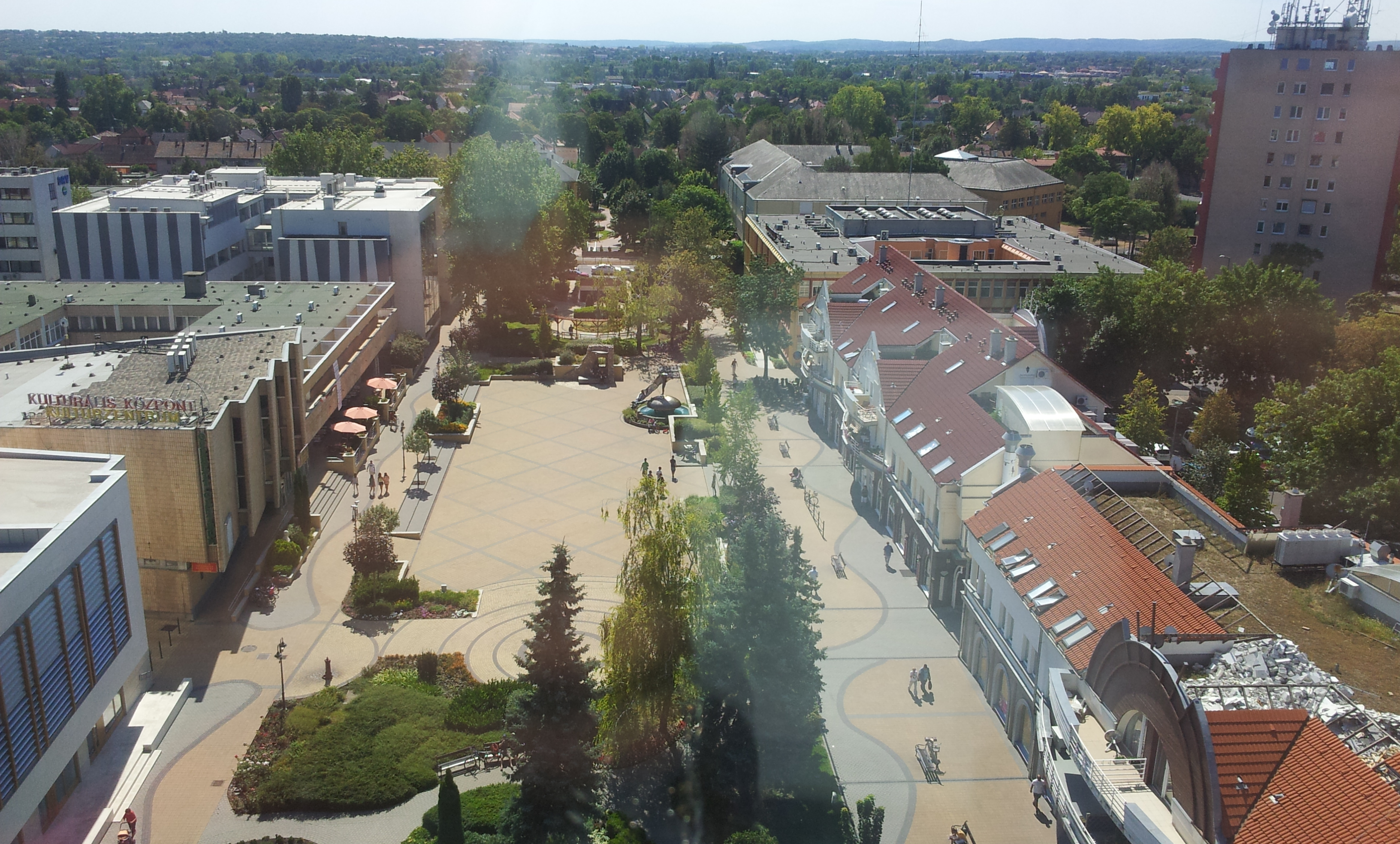 Siófok, Hungary